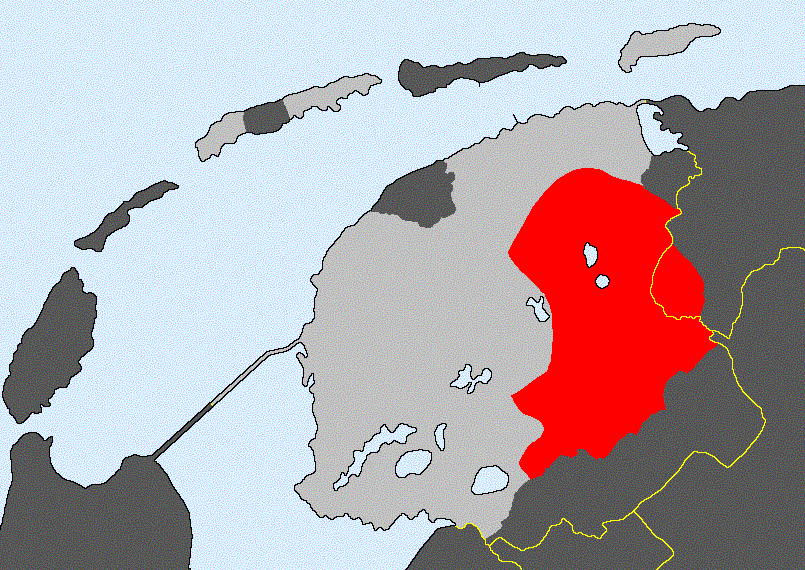 Van fy-wiki, door :fy:Gebruiker:Woadan (originele versie). Woadan, de oorspronkelijke uploader heeft de kaart zelf gemaakt en heeft er geen licentie aan meegegeven. Normaal gesproken valt de kaart dan ook onder GFDL. Ofbyld:Lânkaart lokaasje wâldfrysk.GIF